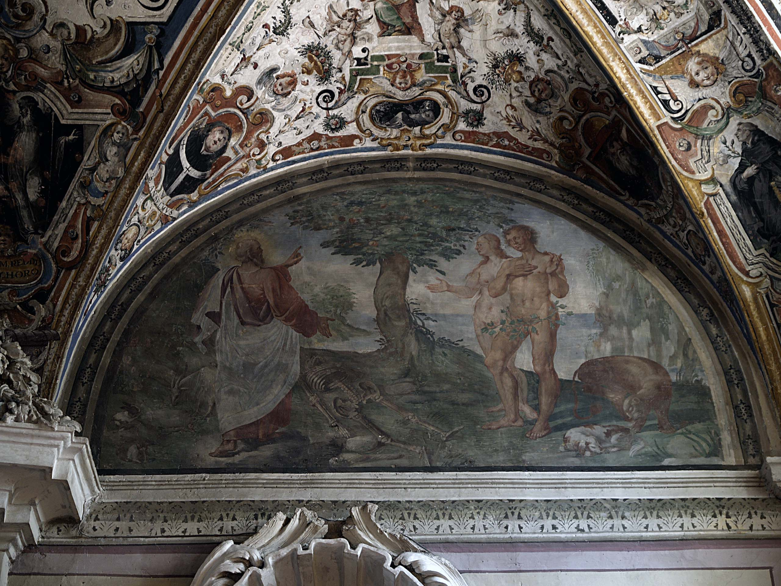 Oratorio Confraternita di San Benedetto Una delle sette lunette che adornano l'Oratorio della Confraternita di San Benedetto opera dei perugini Giovanni Francesco Bassotti e Giovanni Battista Mazzi (1665). This is a photo of a monument which is part of cultural heritage of Italy.